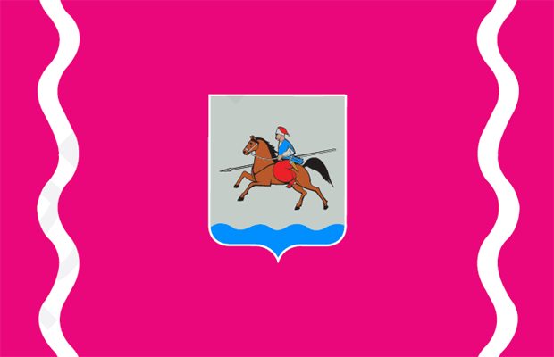 Прапор Черкаського району